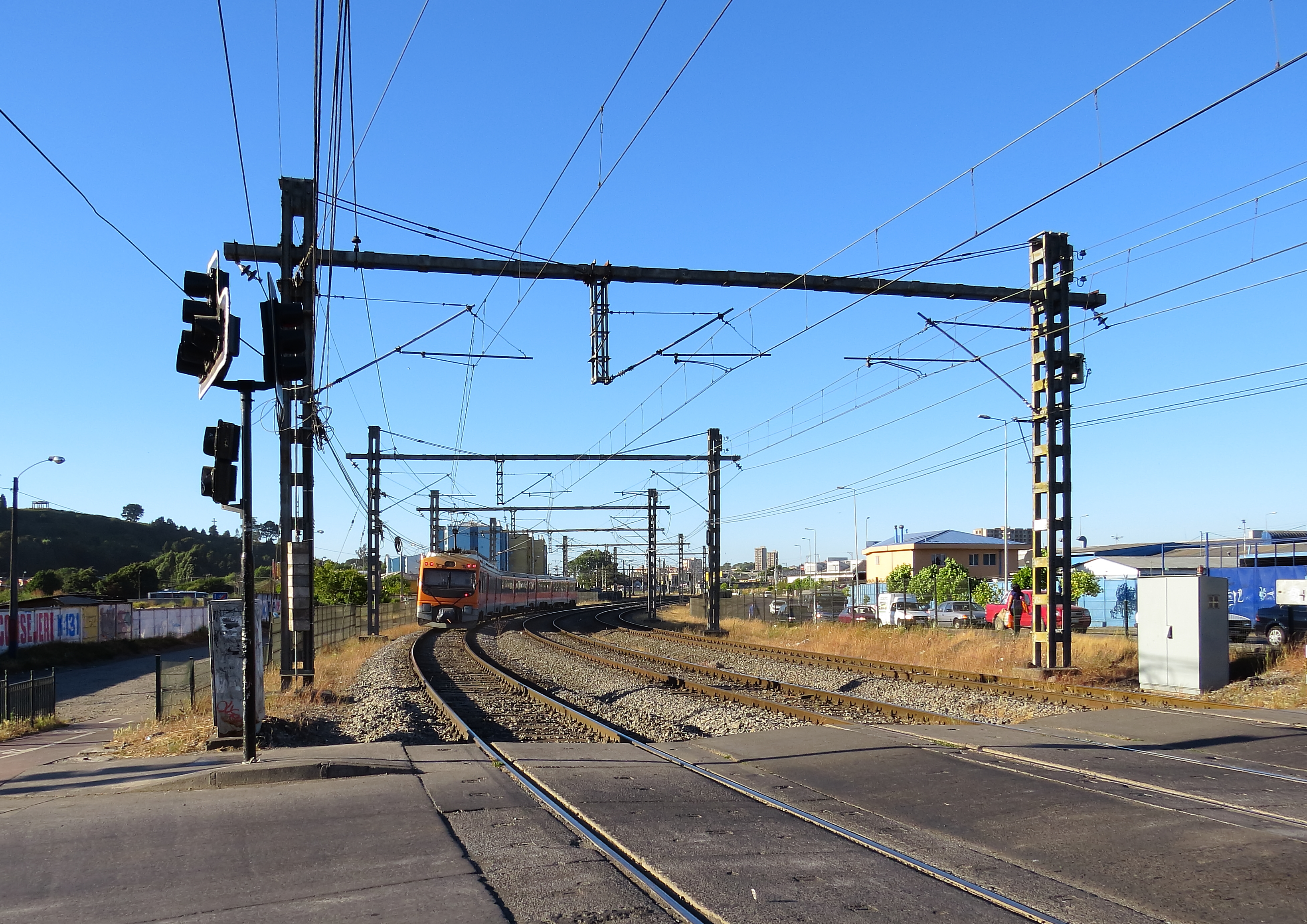 Biotren saliendo desde la estacion de Concepcion